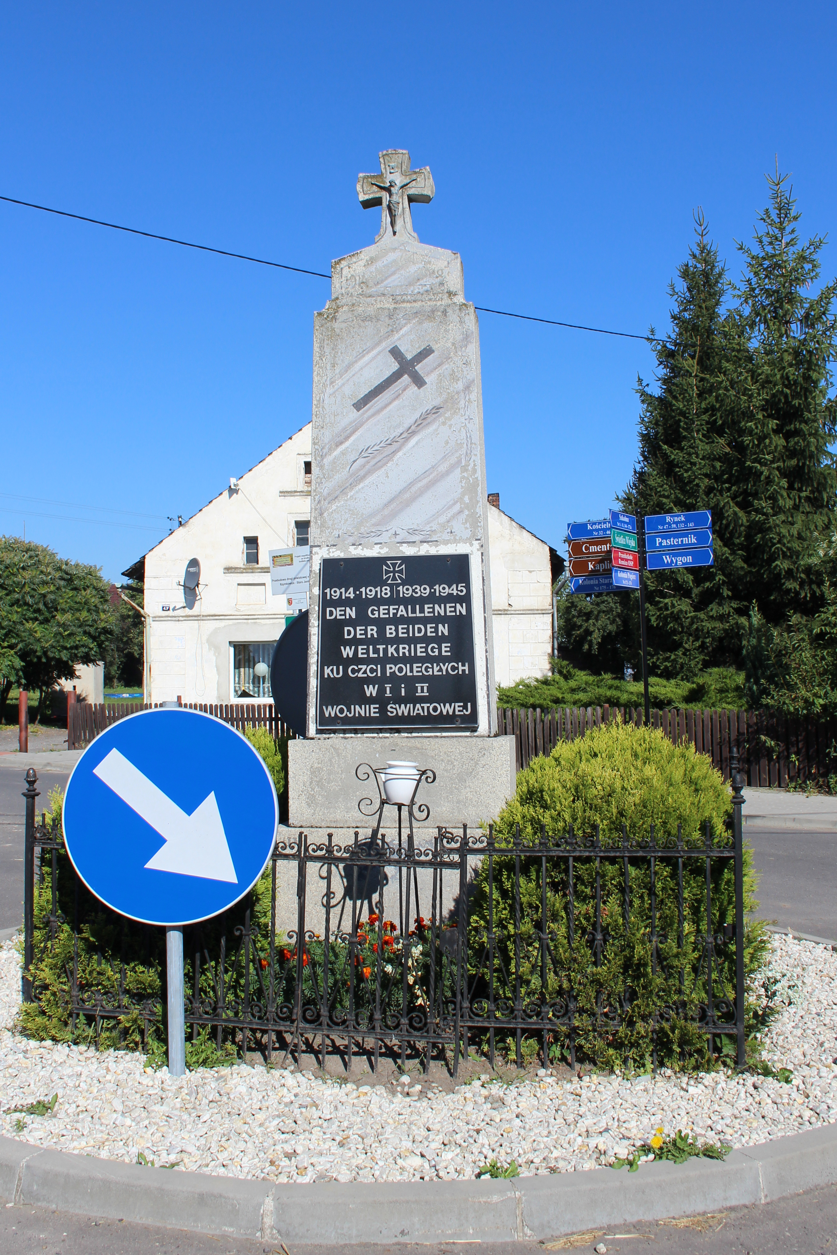 Pomnik ofiar I i II wojne światowej w Rzymkowicach - wieś w Polsce w województwie opolskim, w powiecie nyskim w gminie Korfantów.